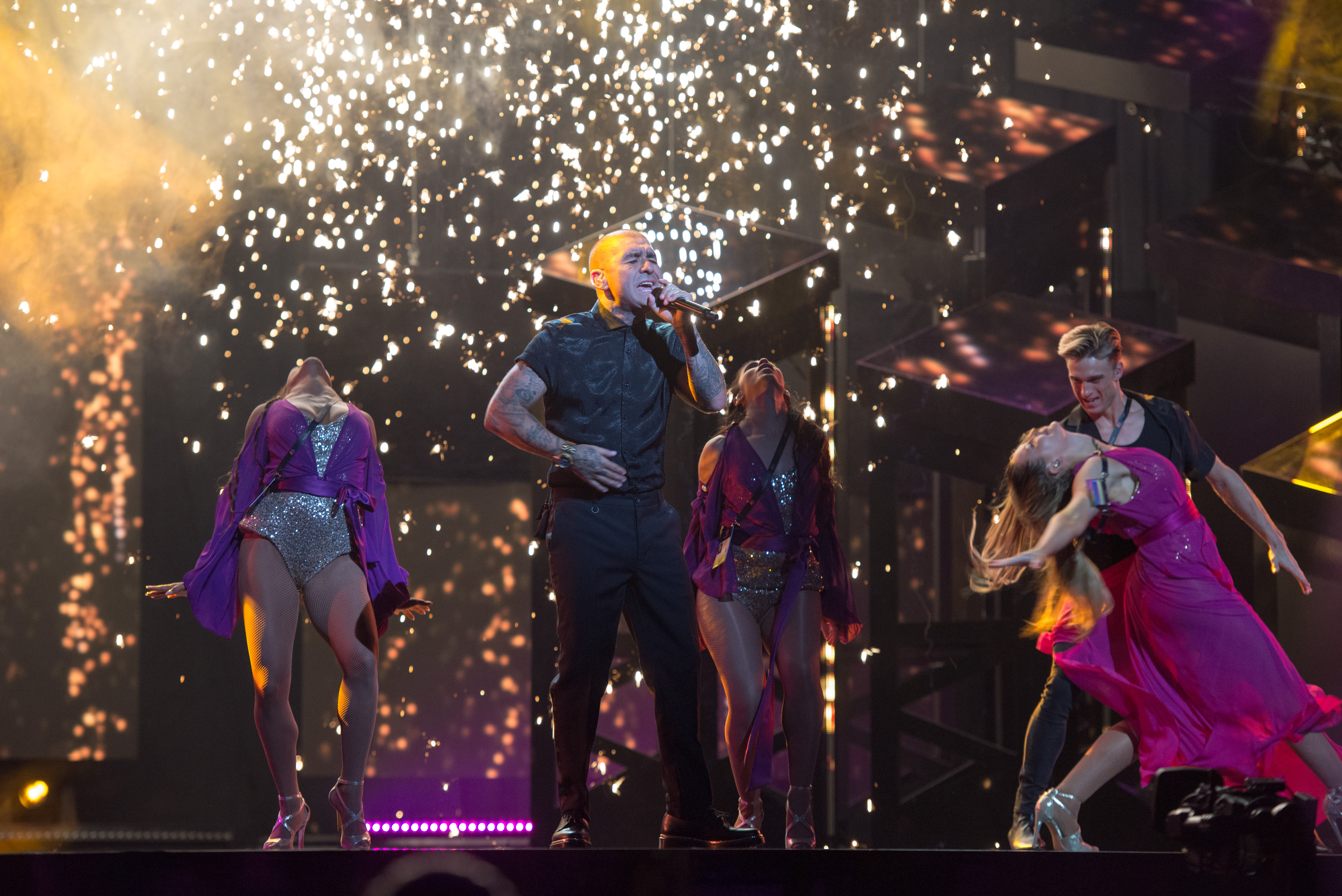 Mendez under genrepet inför Melodifestivalen 2018 i Malmö.